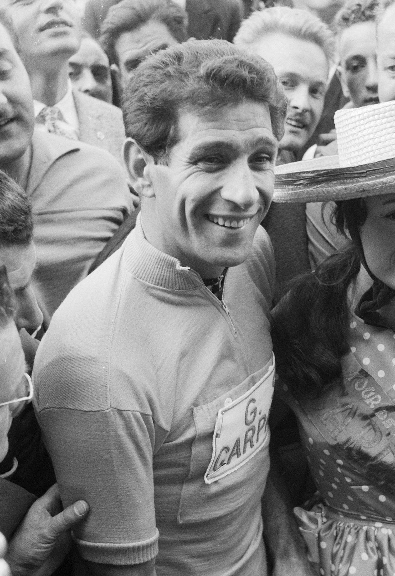 Tour de France , Nencini in gele trui 28 juni 1960